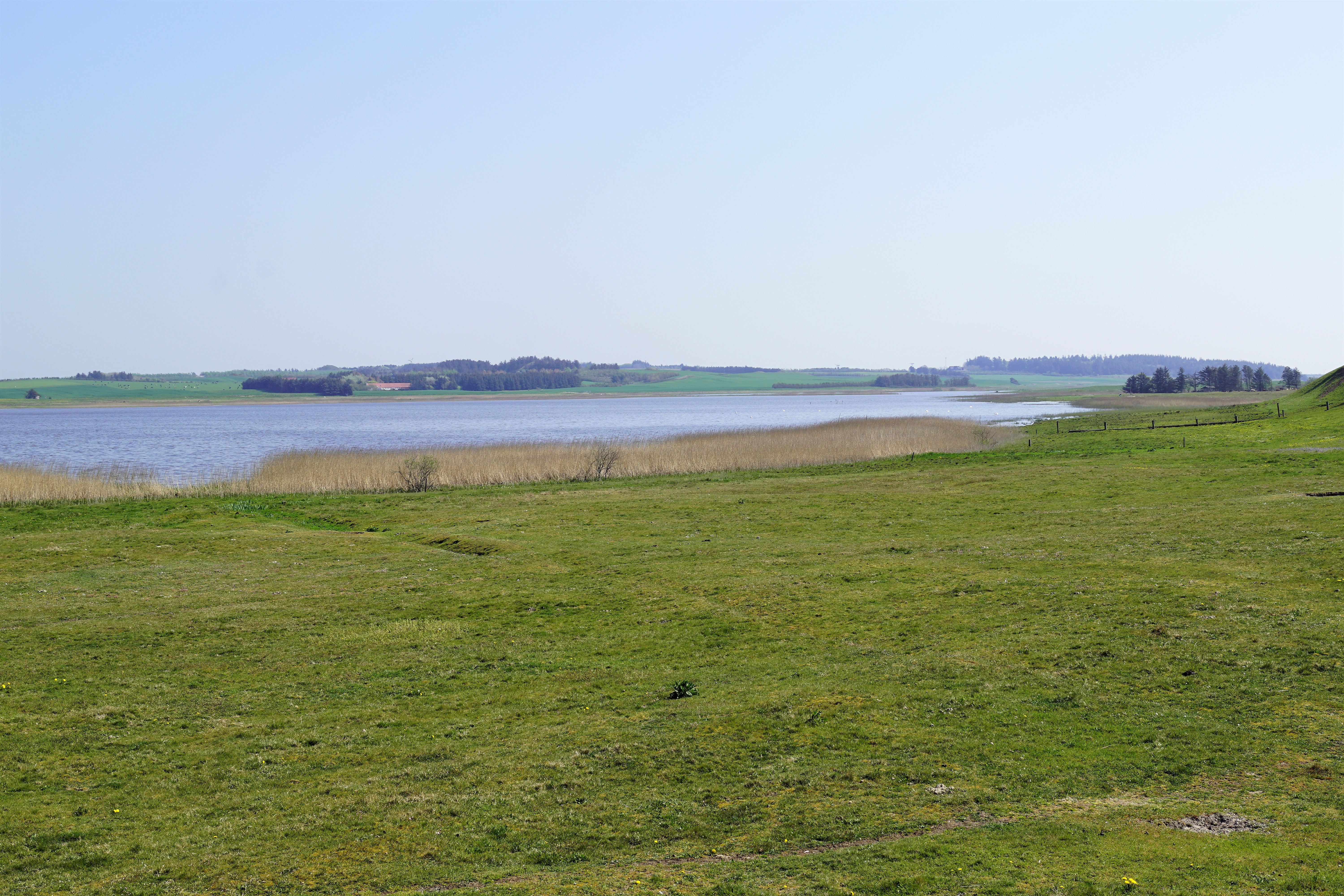 Ove Sø i Thy set mod øst